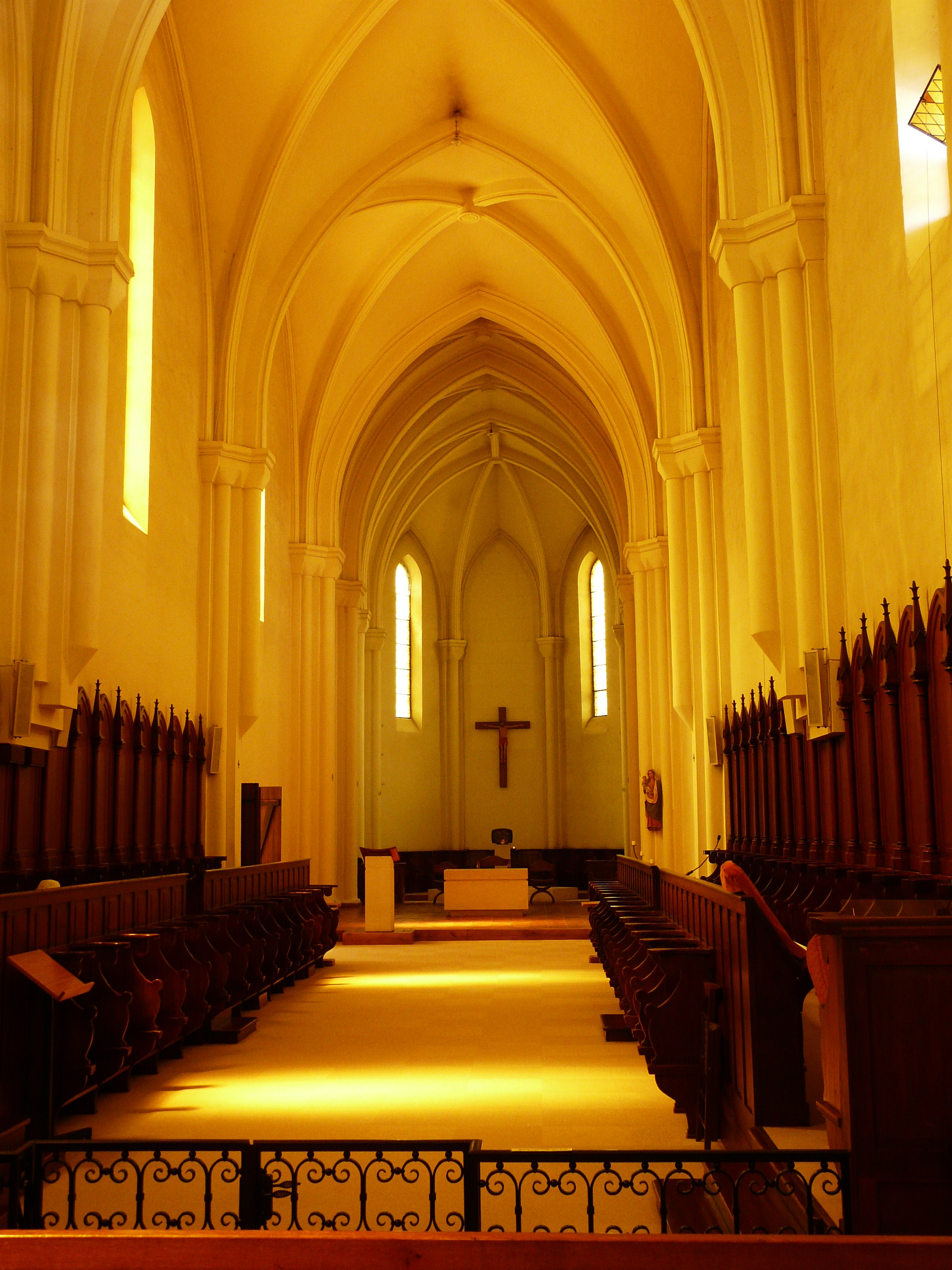 Nef de la chapelle de la Trappe de Bonne Espérance à Échourgnac